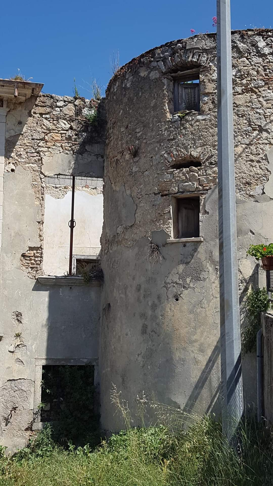 Torre medievale Marsico Nuovo